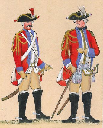 63. Regiment konny dragonów (Leib Dragoner Regiment) (dragon i oficer gwardii konnej litewskiej